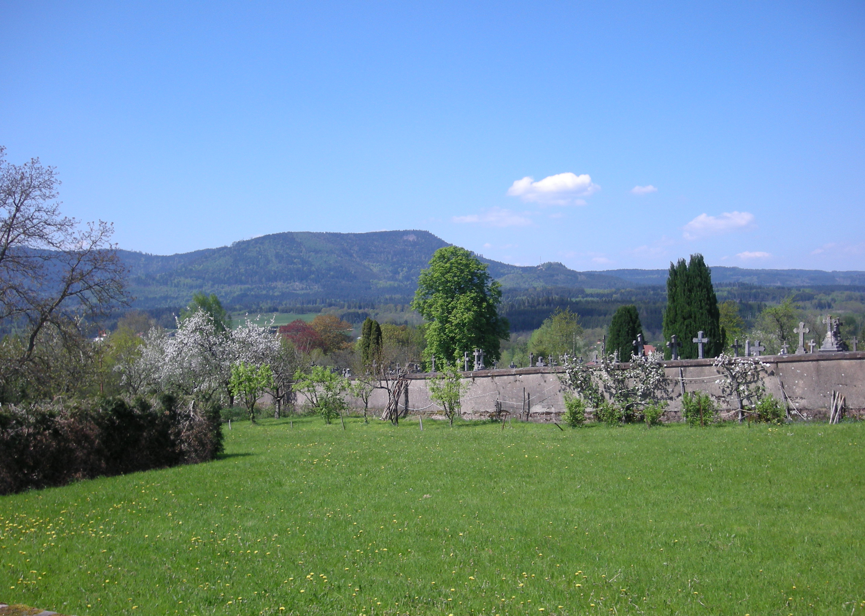 Vue depuis l'église de Bertrimoutier (Vosges)